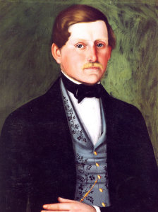 Josef Niederle (1821 - 1894), Český a rakouský politik.